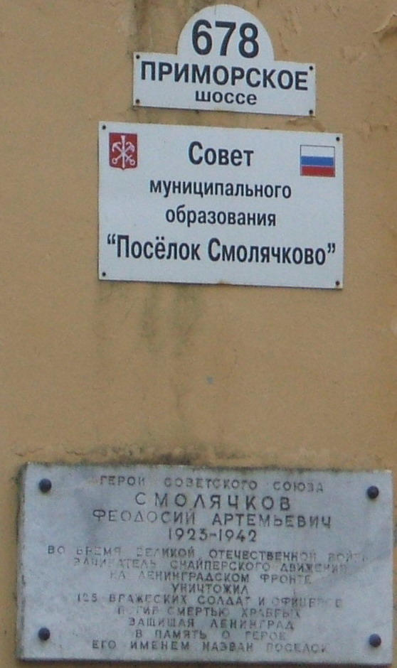 п.Смолячково СПб Мемориальная доска на здании муниципального совета